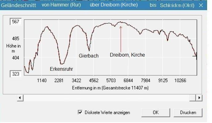 Geländeschnitt über die Dreiborner Hochfläche aus dem Rurtal (Hammer,Kirche) über Dedenborn(Kirche) ins Oleftal (Schleiden, Kirche